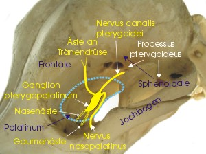 pterygopalatine fossa in a dog